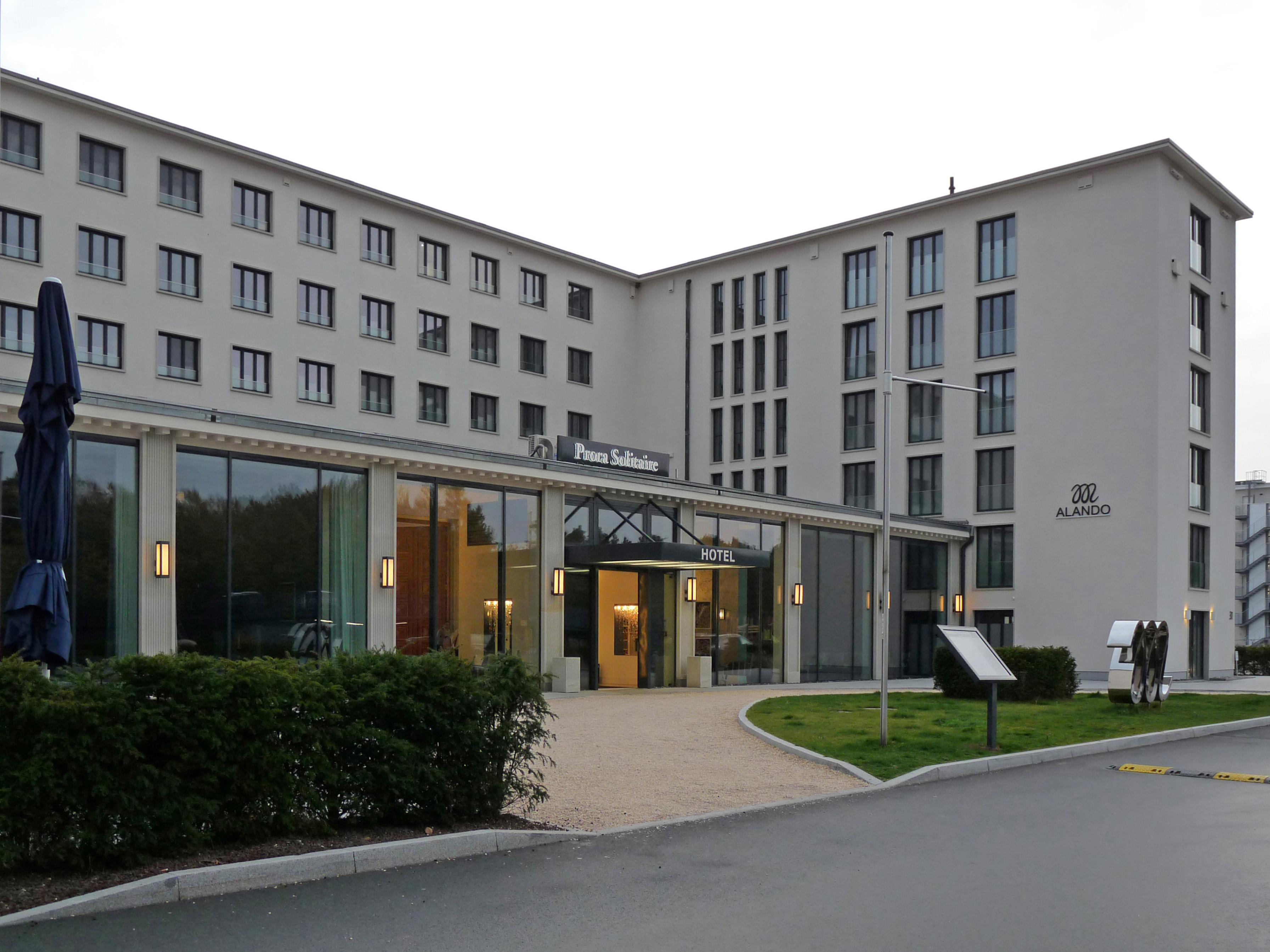 Prora Block 2, Haus 10